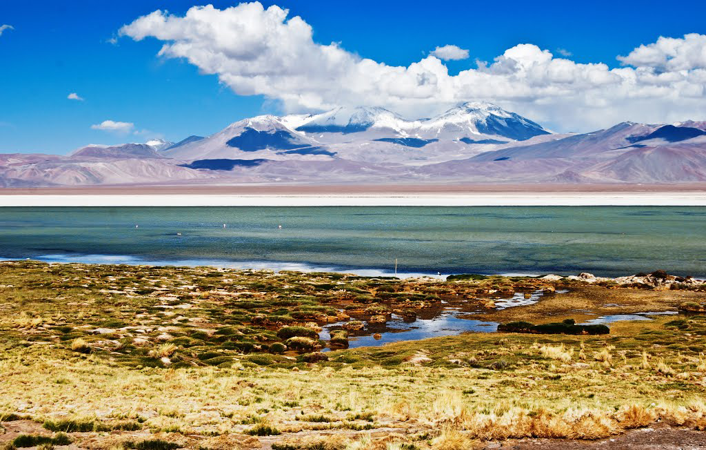 Laguna Santa Rosa, Región de Atacama